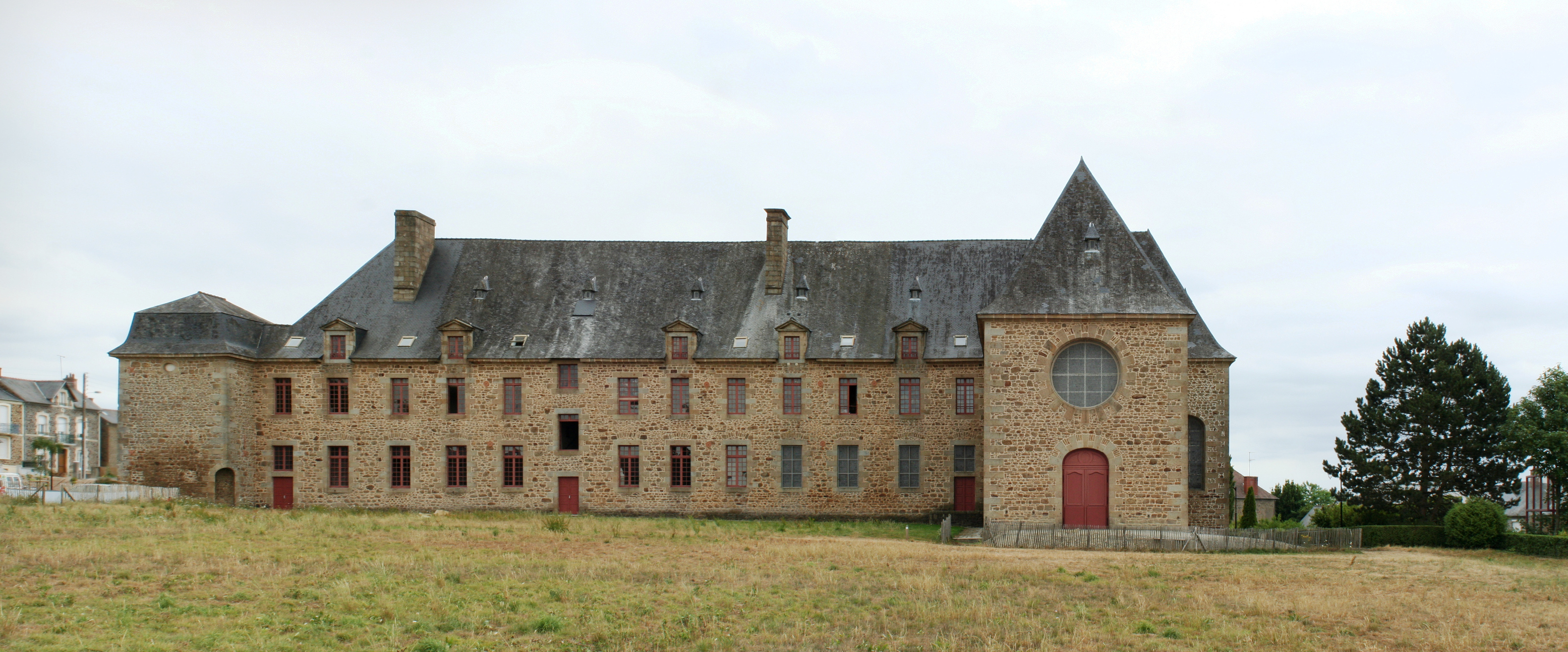 Couvent des Clarisses Urbanistes de Fougères, face ouest.